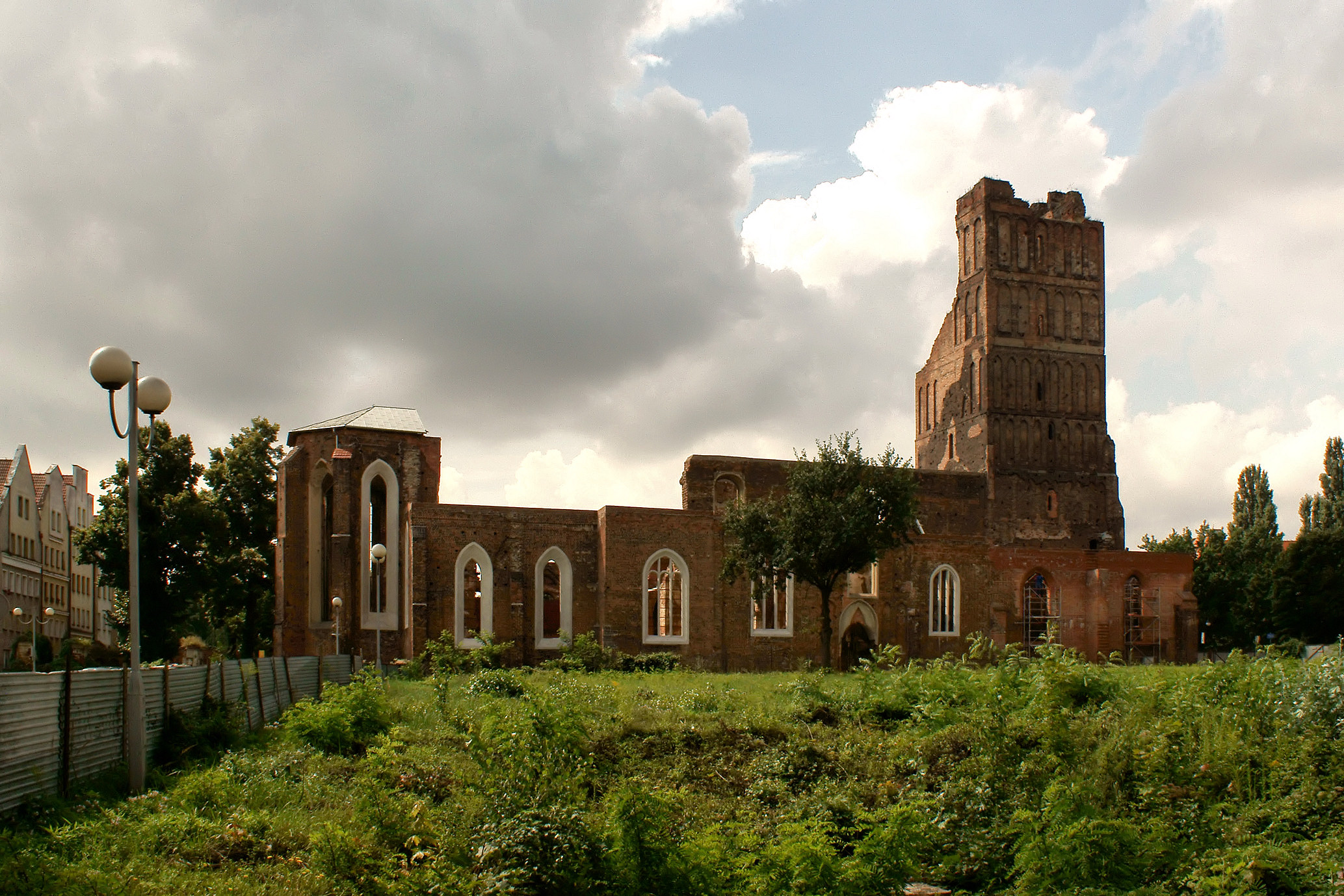 Kościół parafialny św. Mikołaja Głogów, ul. Parafialna